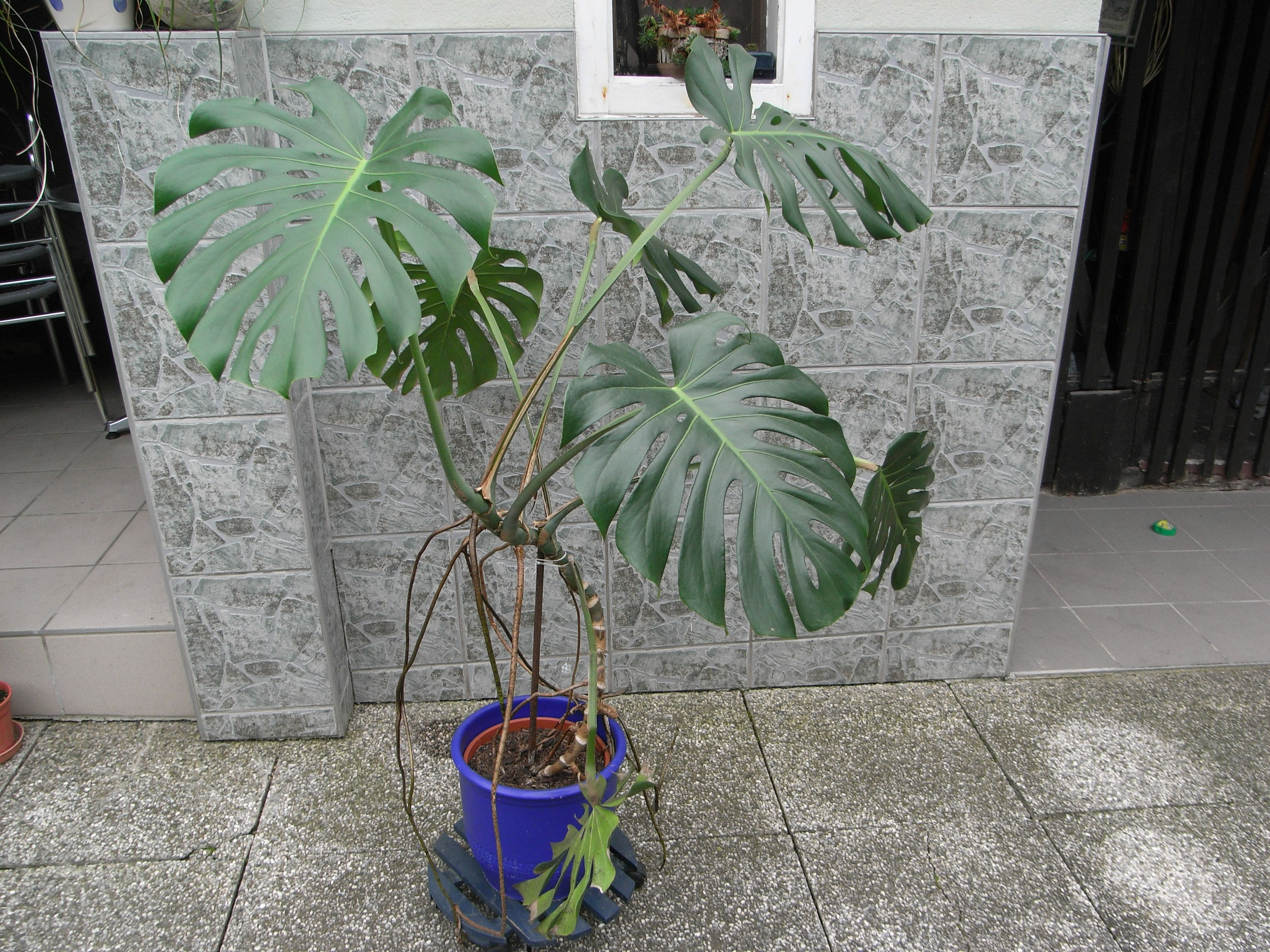 Monstera deliciosa